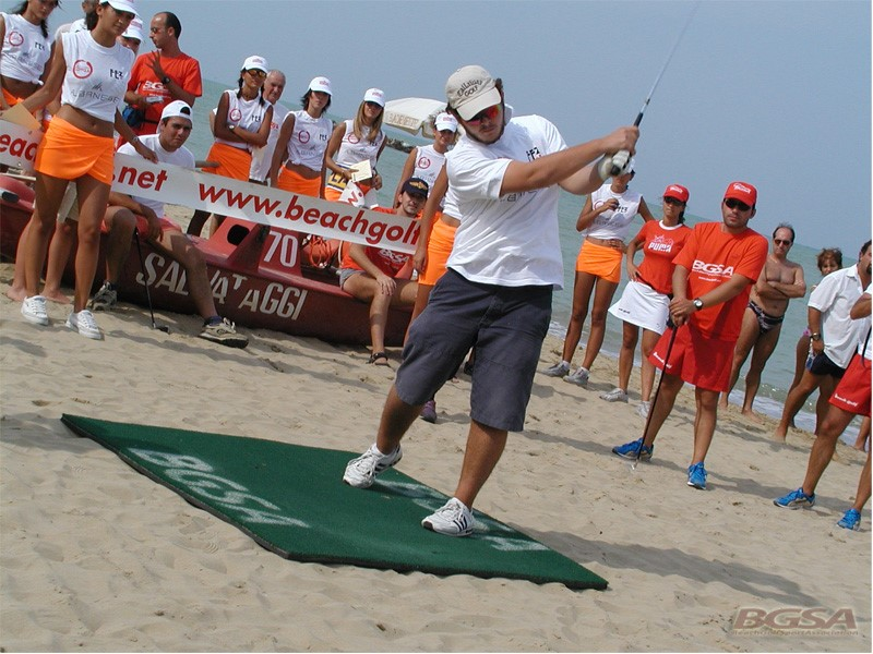 Pocetna tacka